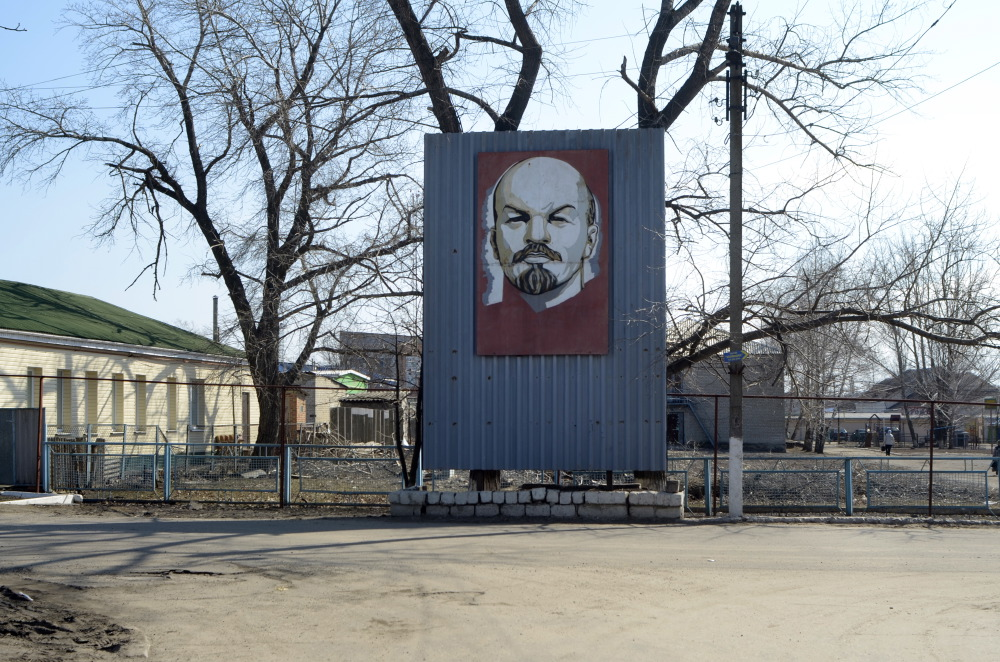 Milovoe, Ukraine, frontière entre l'Ukraine et la Russie, rue Lénine.